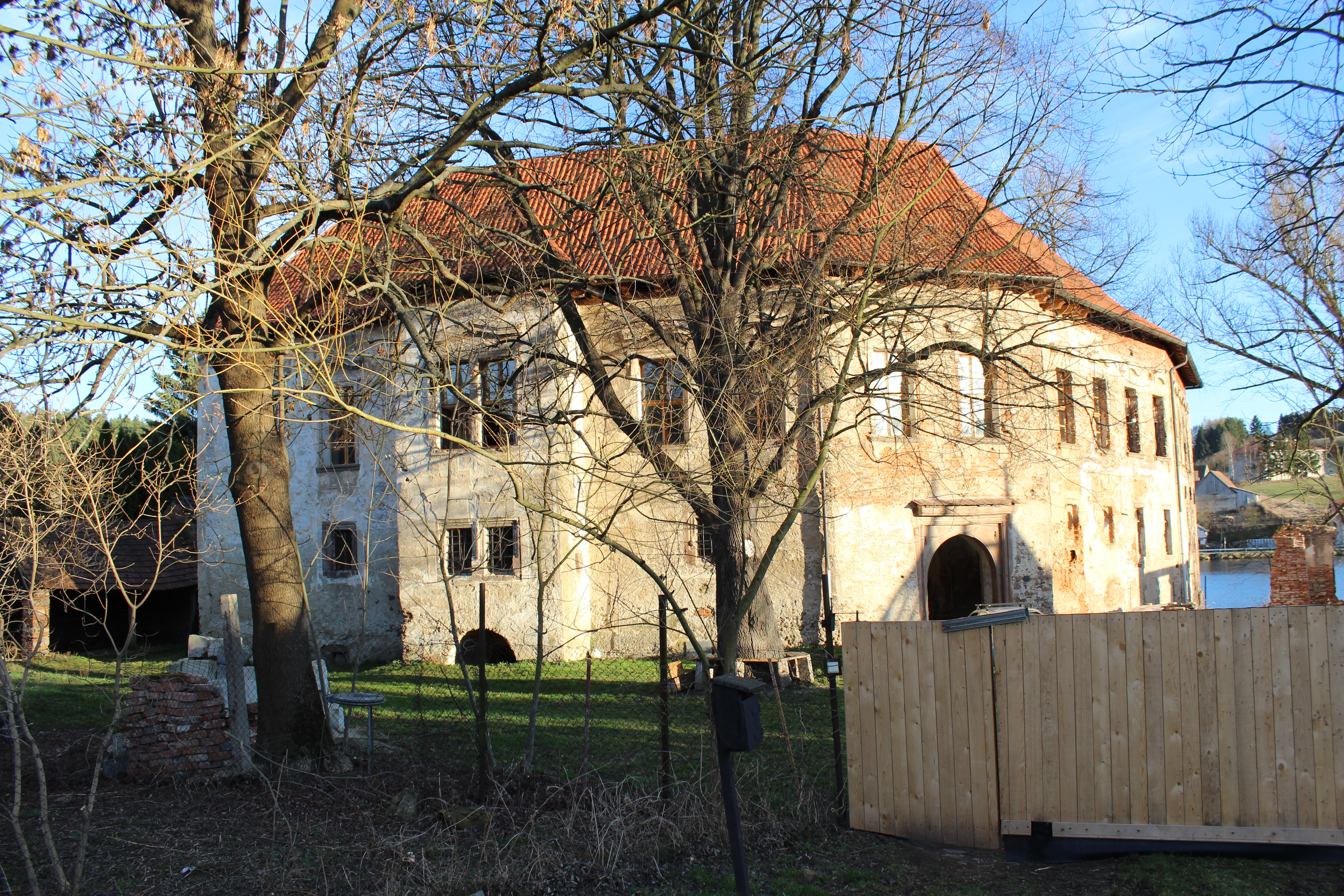 Vodní tvrze Popovice (okres Benešov) Tvrz v pohledu z popovické návsi ve směru na jihozápad. Snímek pořízen z přístupové cesty k tvrzi. Stromy bez listí umožňují pohled na severní a západní křídlo tvrze.